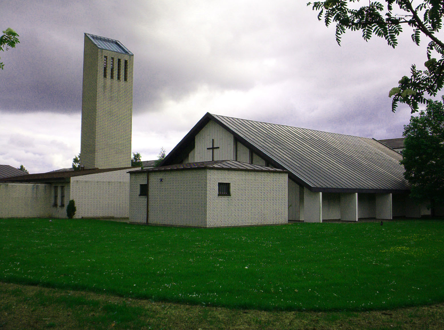 Nygårdskirken i Brøndby